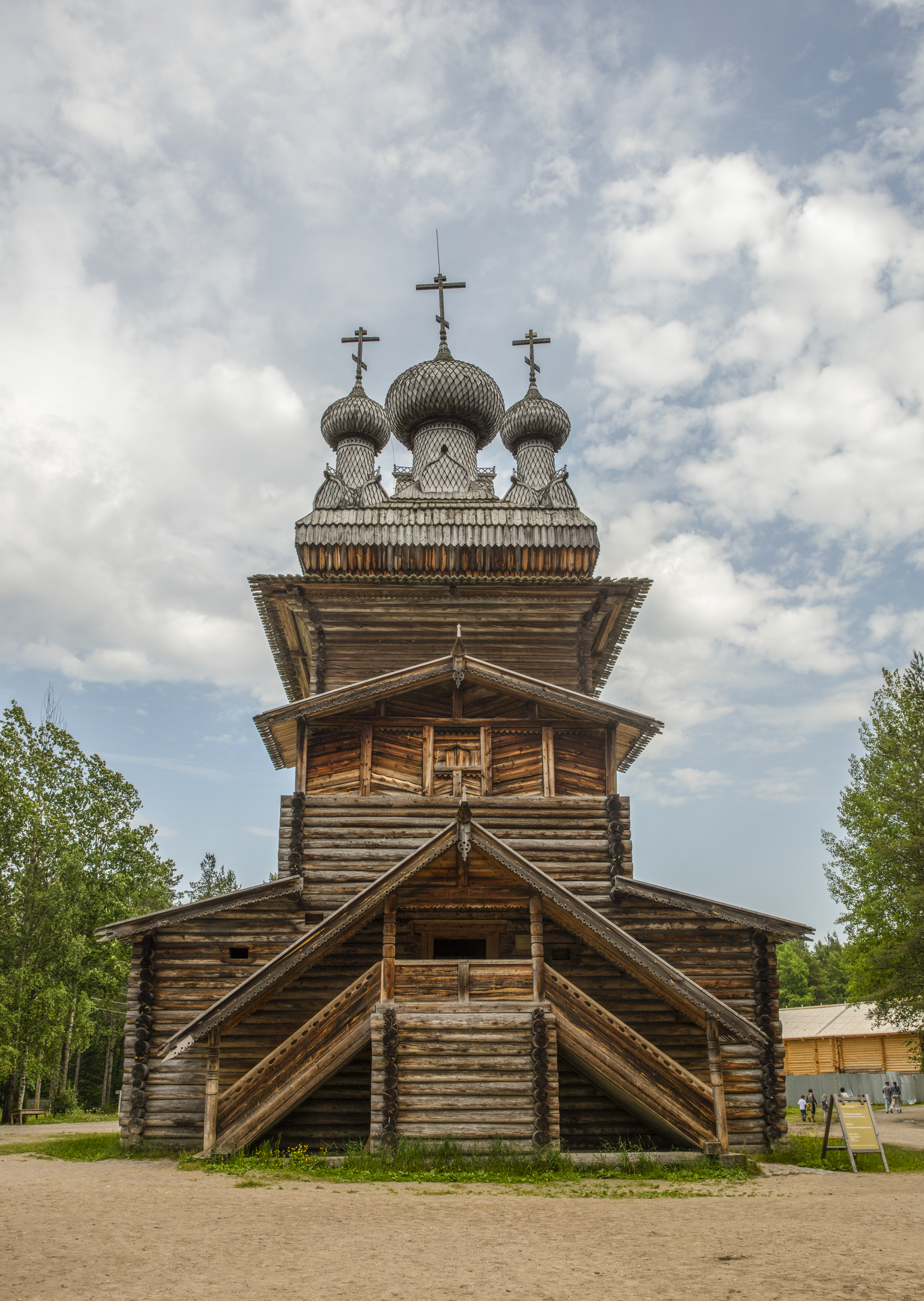 Церковь Вознесения Господня из с.Кушерека Онежского района: Малые Корелы, Приморский район, Архангельская область